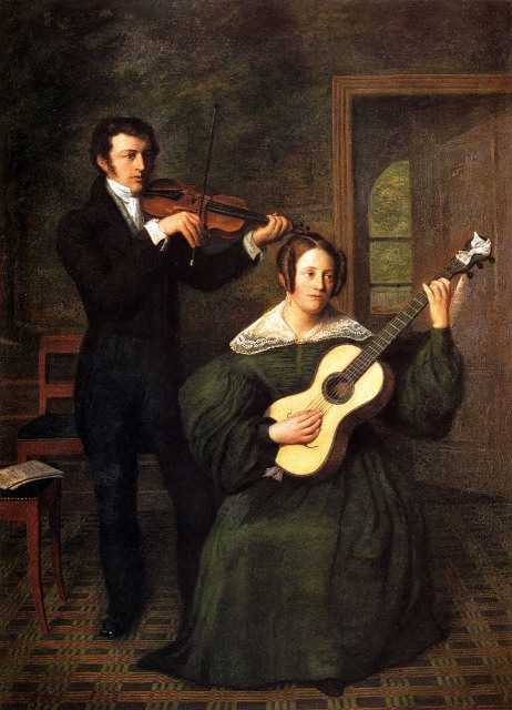 Het duet